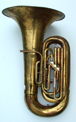 A "Monster" Conn BBb tuba model 28J